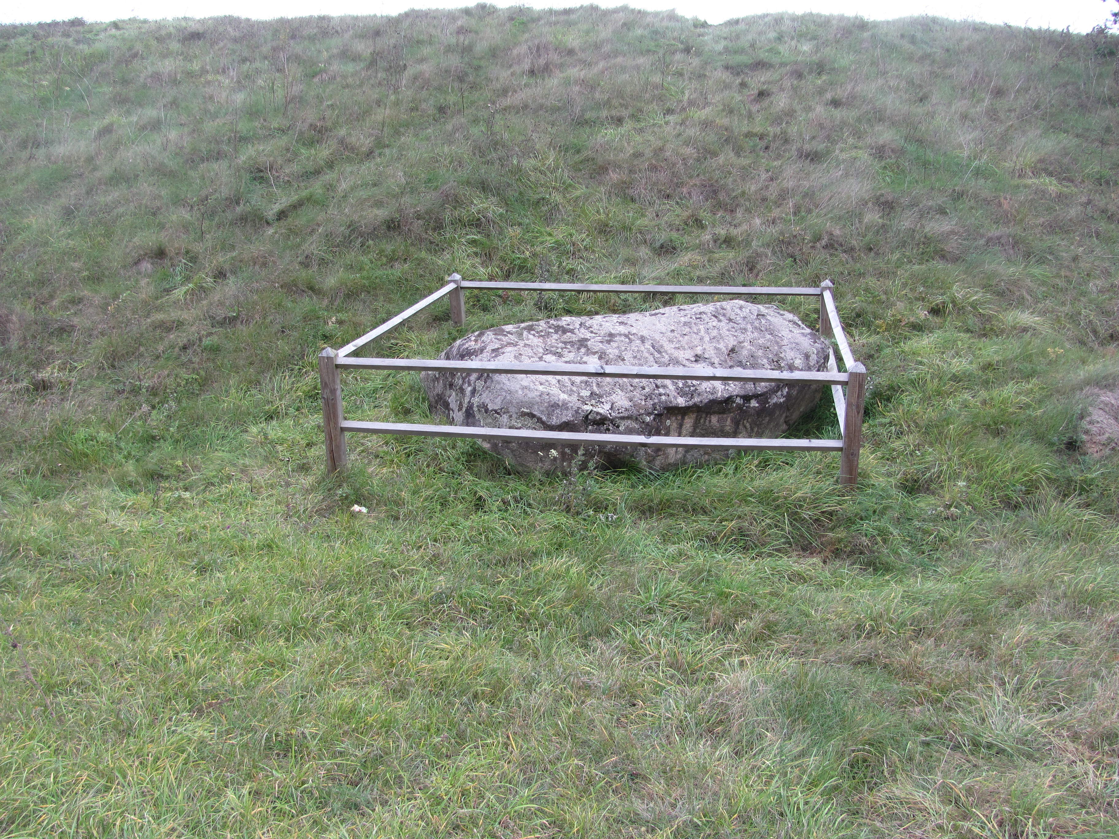 Užpalių sen., Lithuania